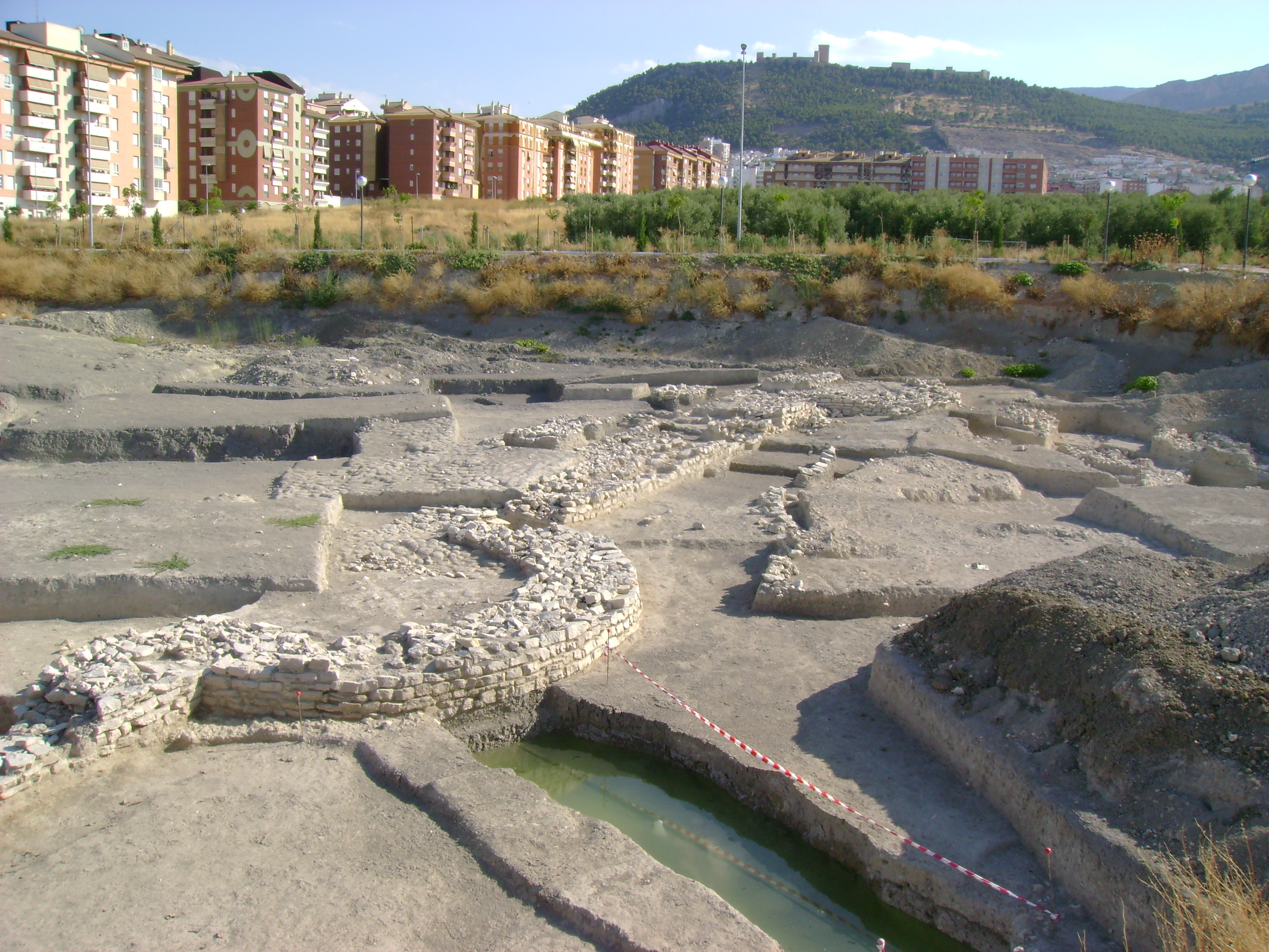 Muralla calcolítica de Marroquíes Bajos en Jaén. Compárese con esta foto, cinco años después, y con esta otra, de unos tres años más tarde a la anterior.